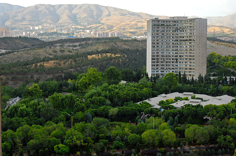 شهرک امید ، تهران ، نمای شمالی